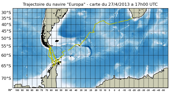 CarteBE-IFREMER-27avr13-WKA